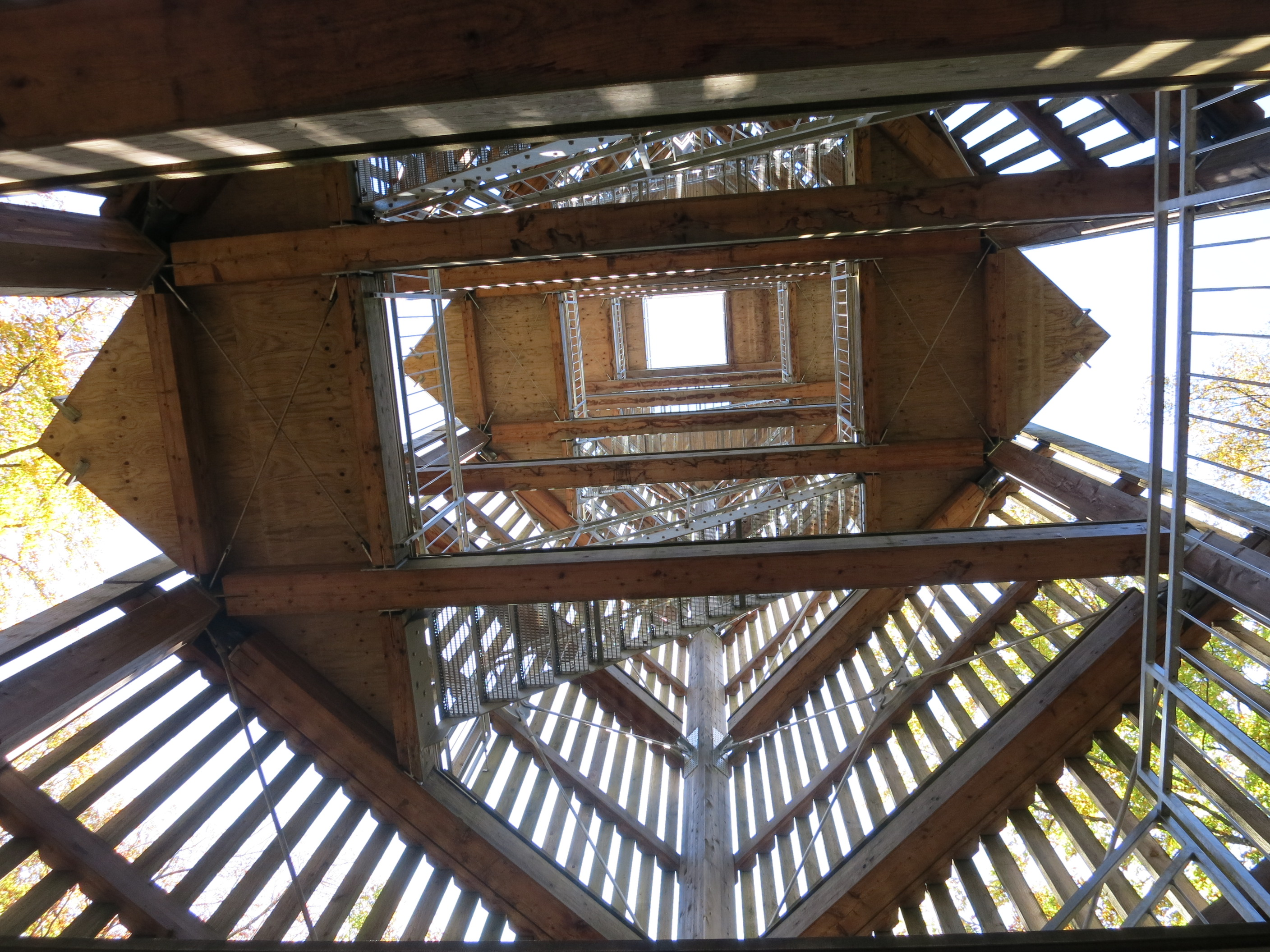 Cheisacherturm AG, Schweiz